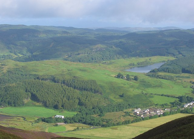 Kilmelford seen from Ceann Mor